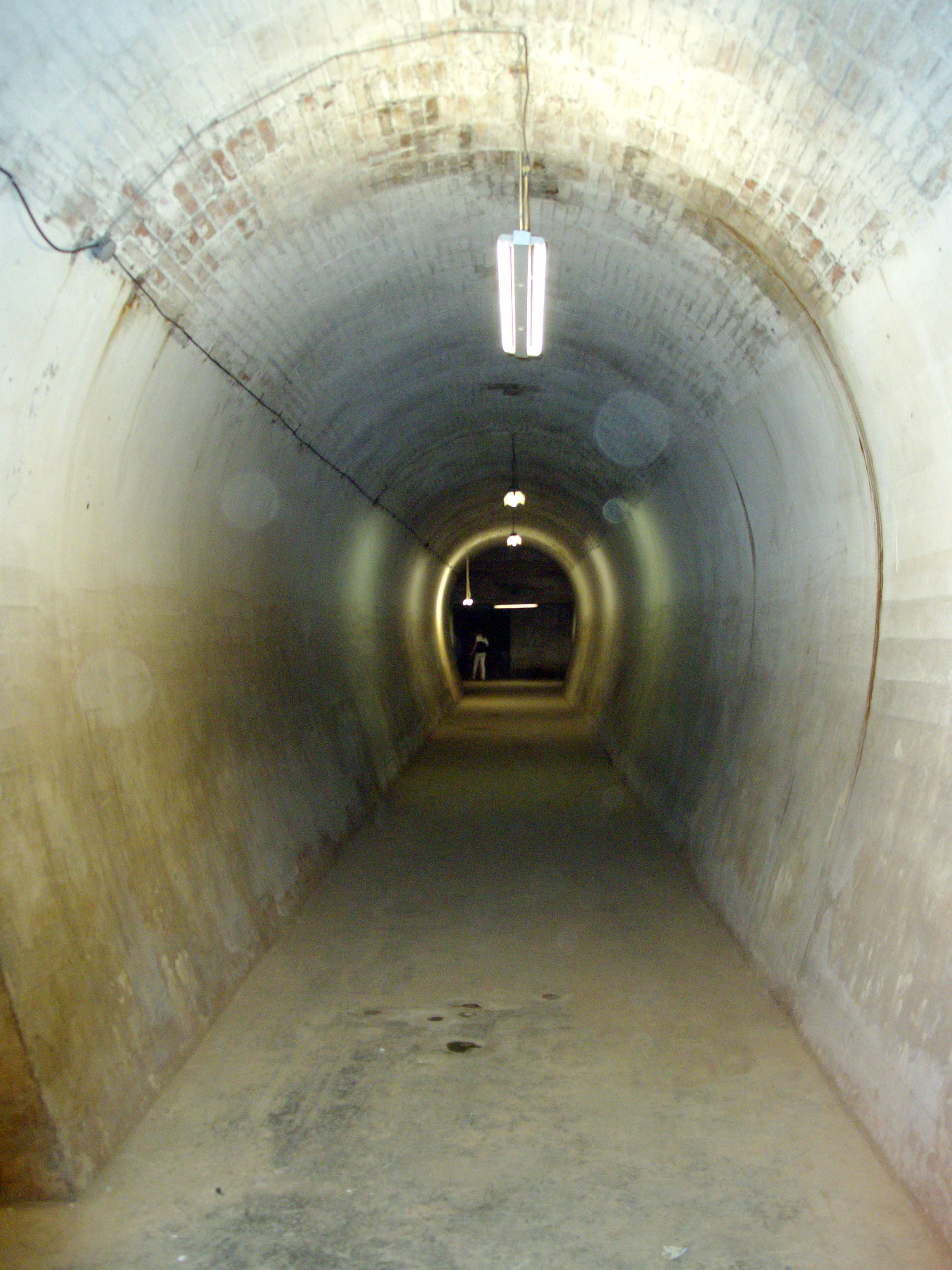 Galería norte.